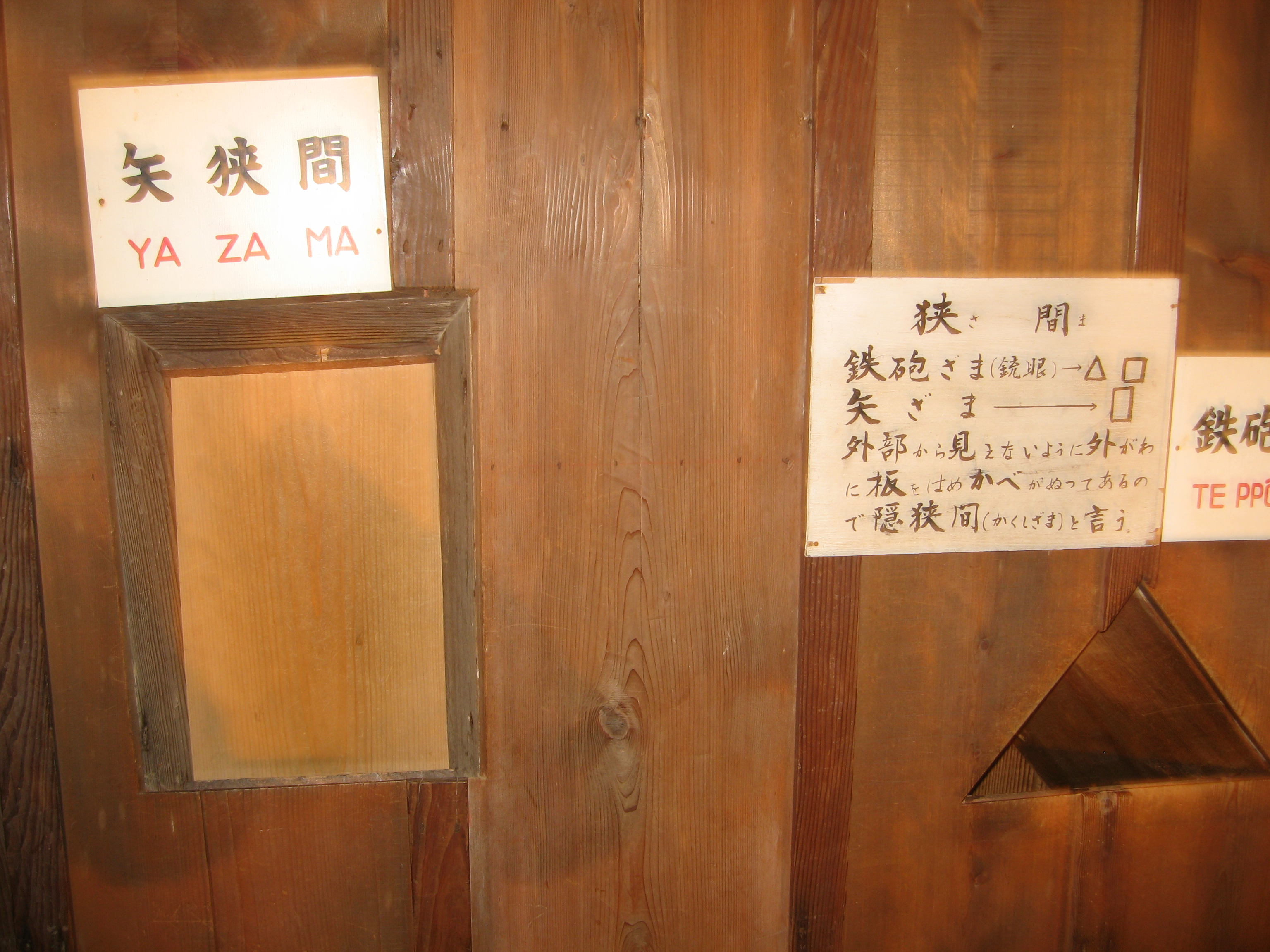 彦根城の矢狭間(左)と鉄狭間(右)